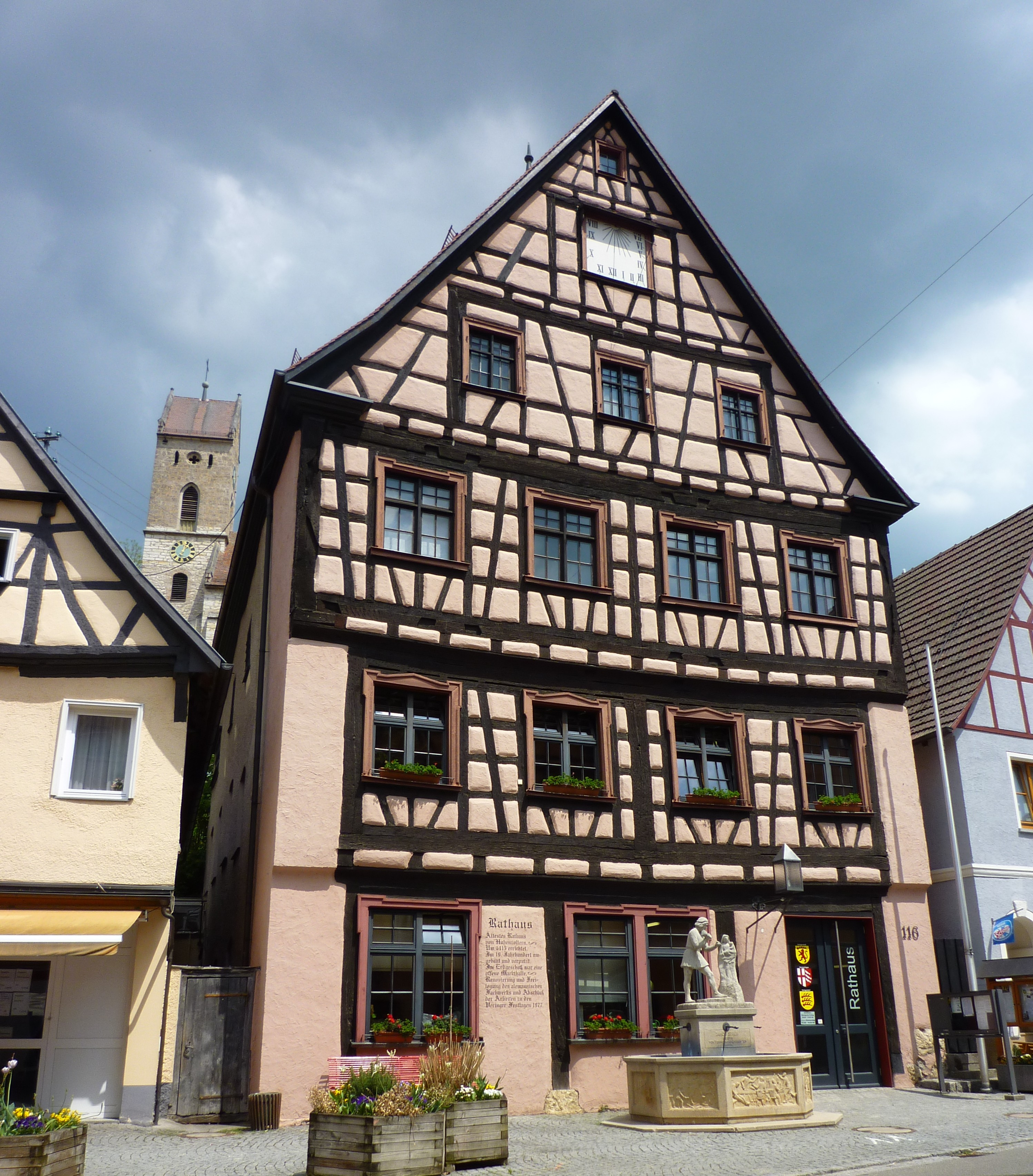 Veringenstadt - Fachwerk-Rathaus 1415